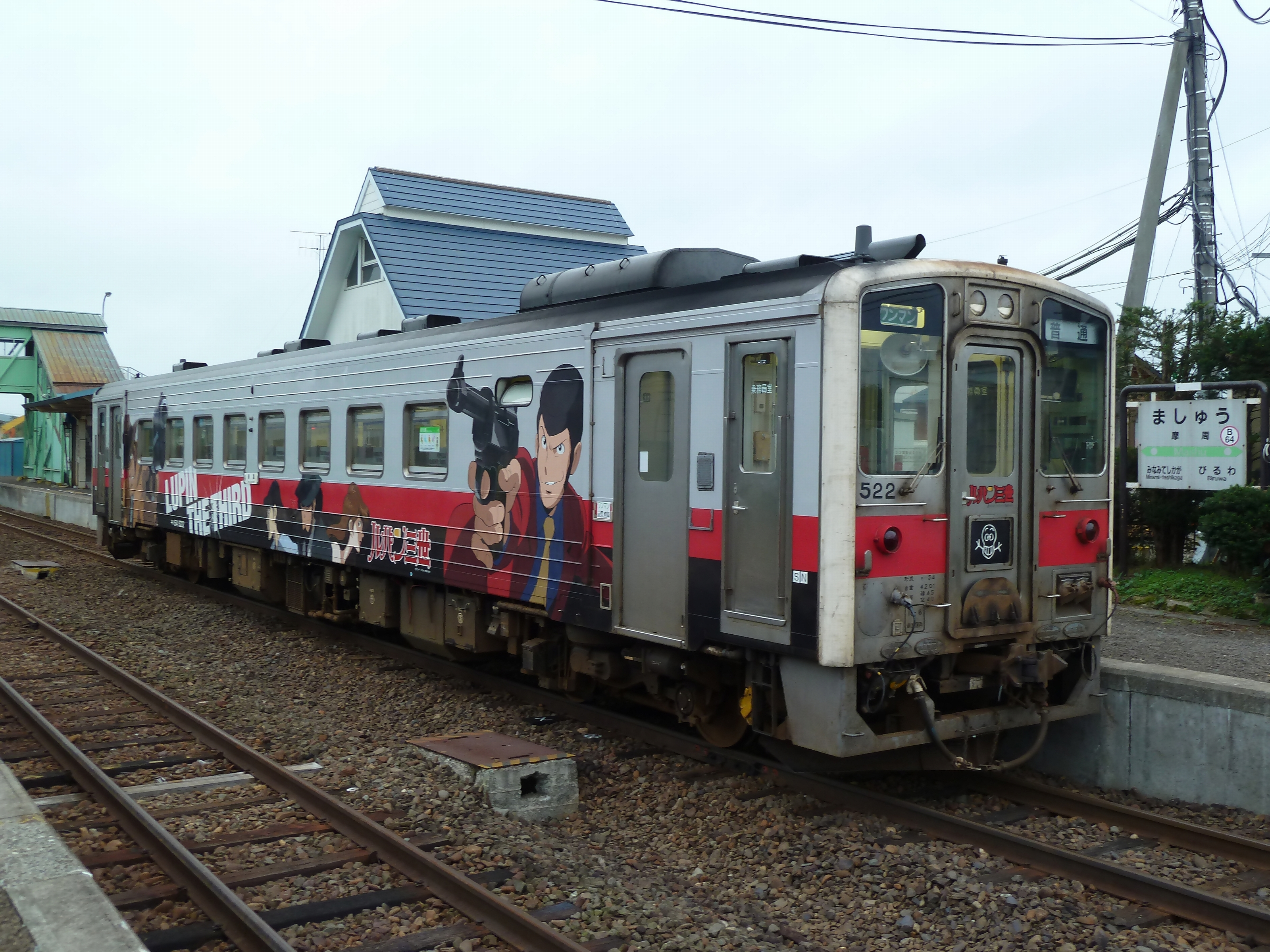 JR北海道キハ54形気動車（キハ54 522）釧網本線摩周駅で撮影